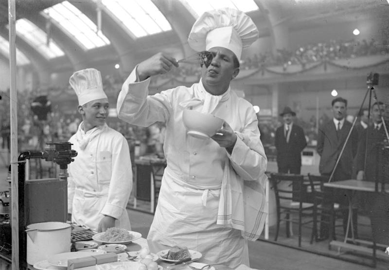 Deutsche Filmschauspieler kochen um die Wette ! Auf der Berliner Kochkunstausstellung in den Ausstellungshallen am Kaiserdamm zeigten die prominentesten deutschen Schauspieler ihre Kunst im Kochen. Der Film- und Bühnenschauspieler Fritz Kampers kostet seine selbst zubereitete Speise.